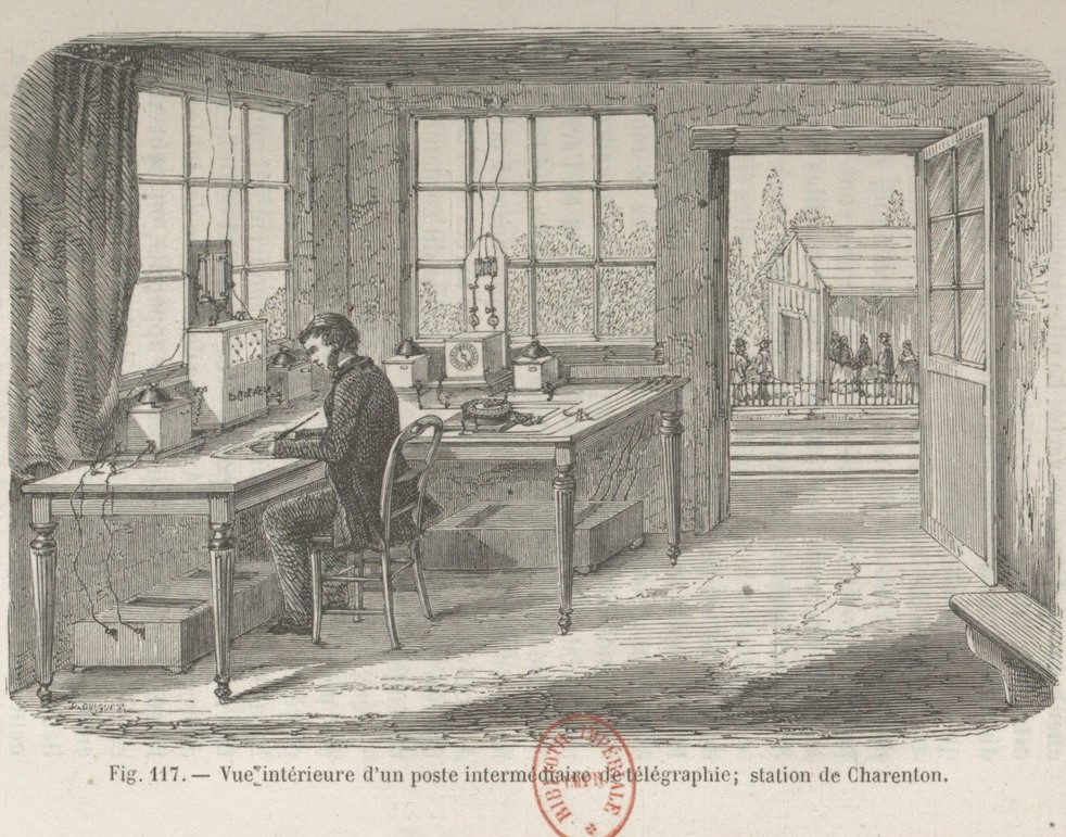 Poste de télégraphe de la gare de Charenton vu par l'illustrateur de l'ouvrage Les chemins de fer publié en 1869.